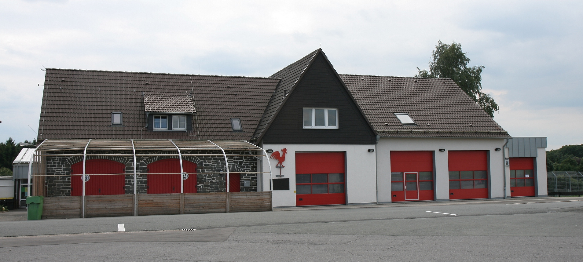 Gebäude der „Freiwilligen Feuerwehr Hülscheid“ in Schalksmühle-Spormecke.